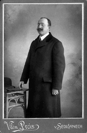 Karel Ladislav Kukla (1863 - 1930), Český prozaik, dramatik a novinář .